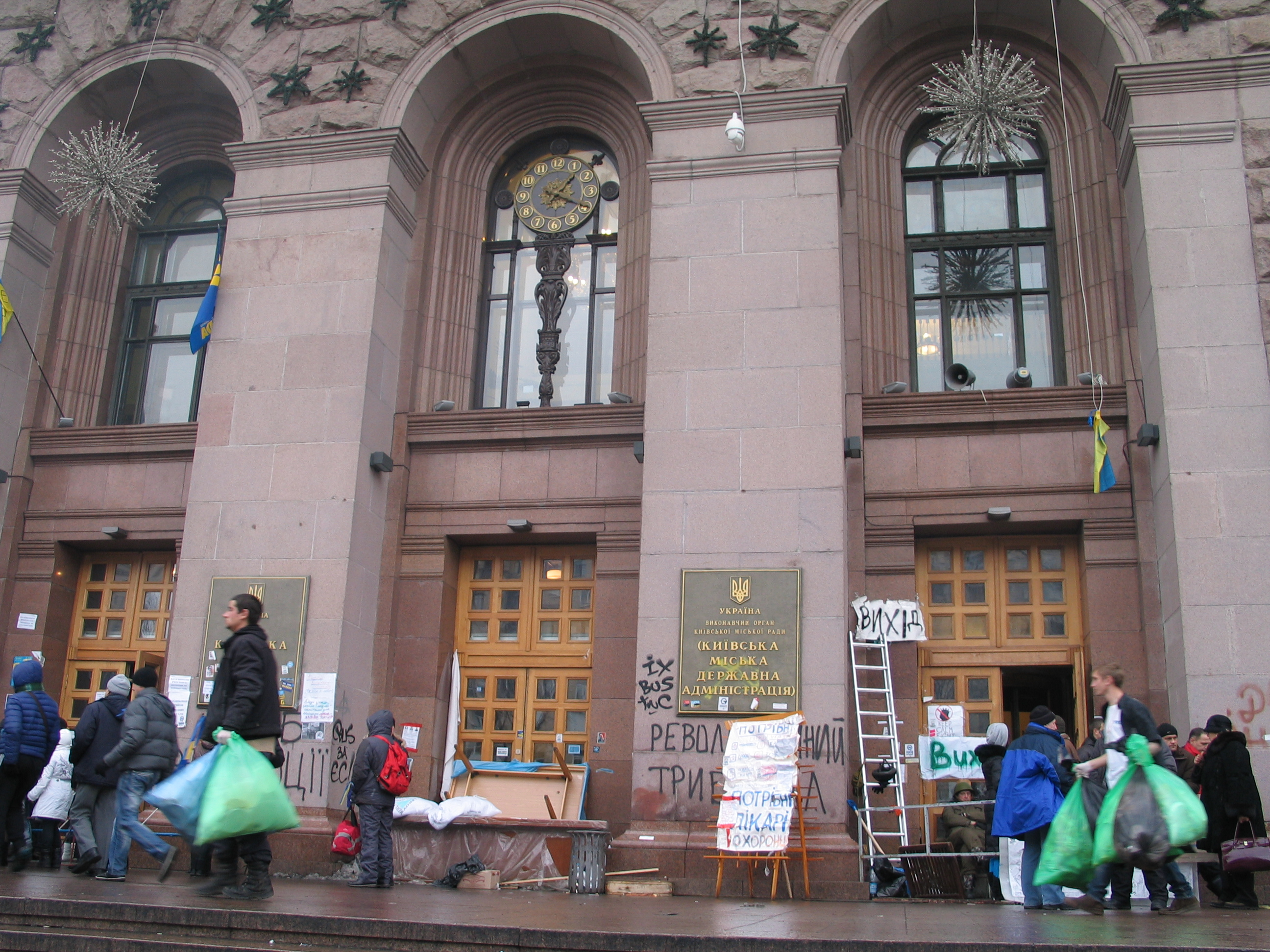 Киевская городская администрация, захваченная повстанцами во время Евромайдана